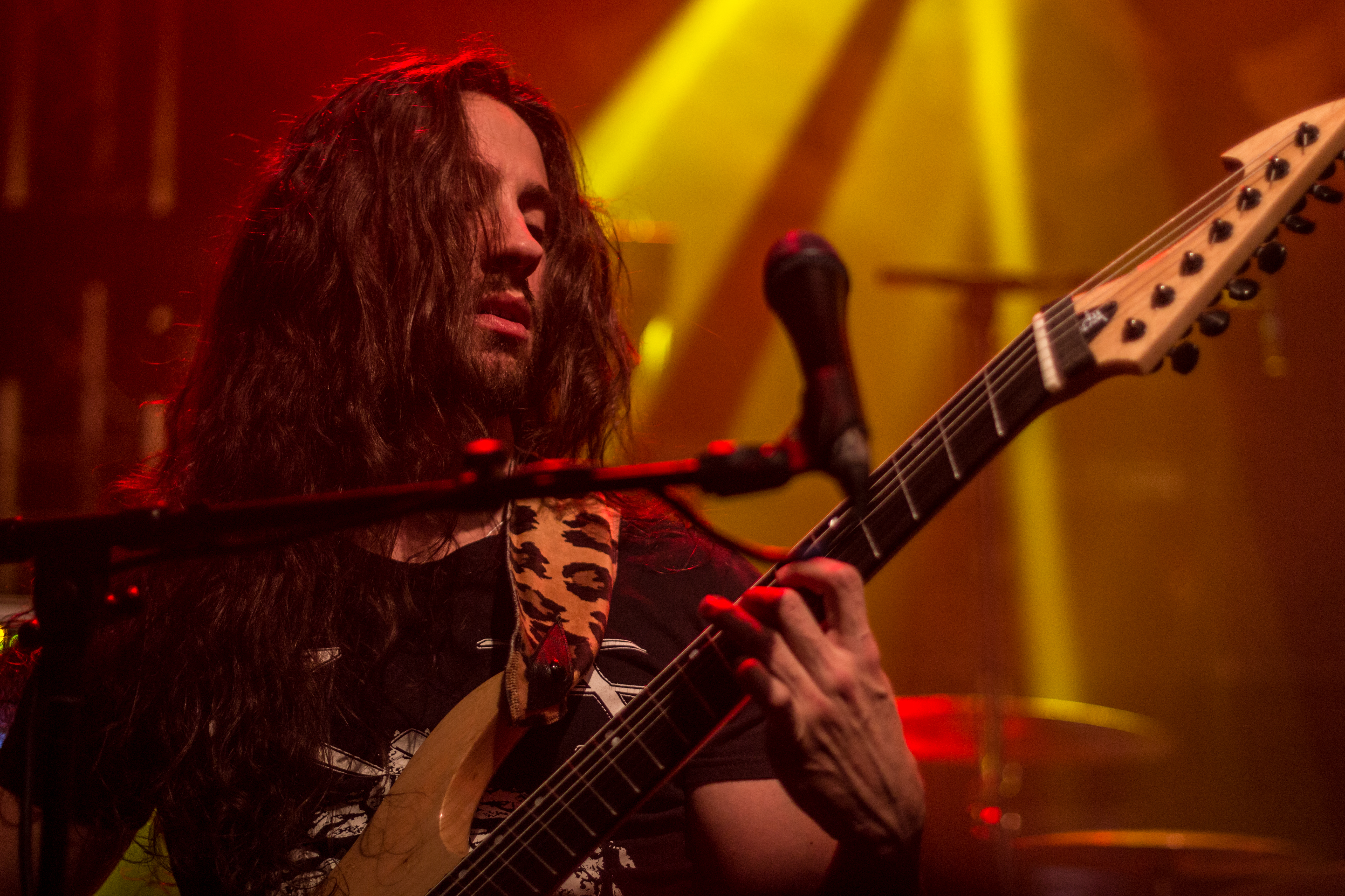 Nicolas Alberny, guitariste de Gorod lors d'un concert à l'usine à chapeau (Rambouillet) le 30 mars 2019.